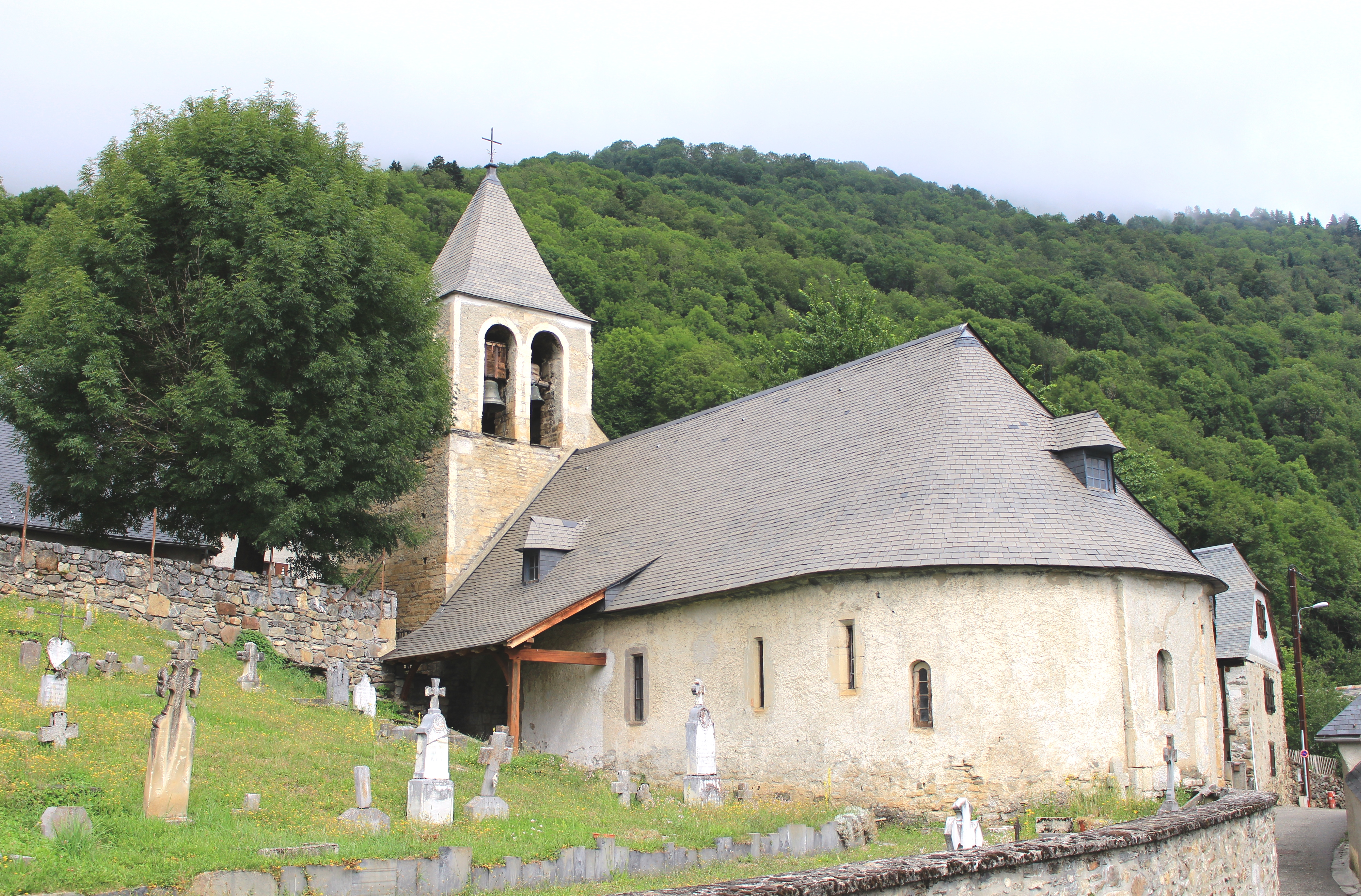 Église Saint-Mercurial de Vielle-Louron (Hautes-Pyrénées)